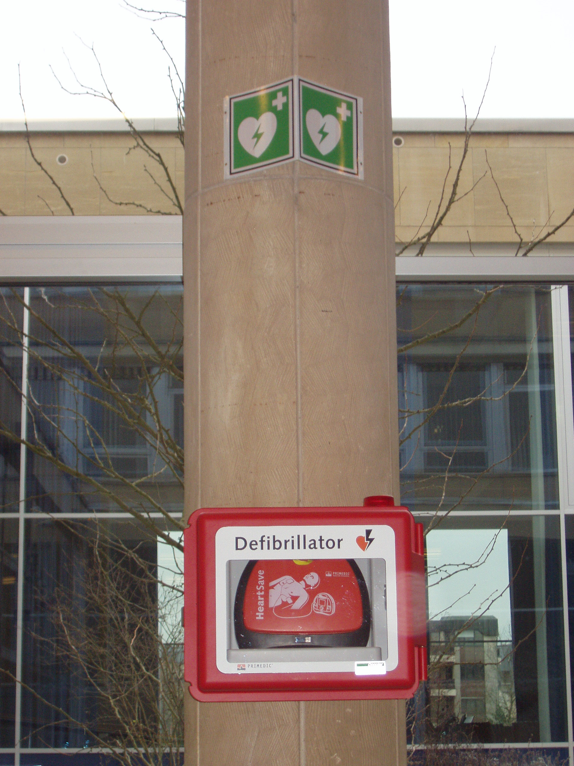 Den Defibrillator (AED) esou wéi en am Kolléisch zënter Februar 2009 ophänkt a fir jiddereen zougänglech ass.